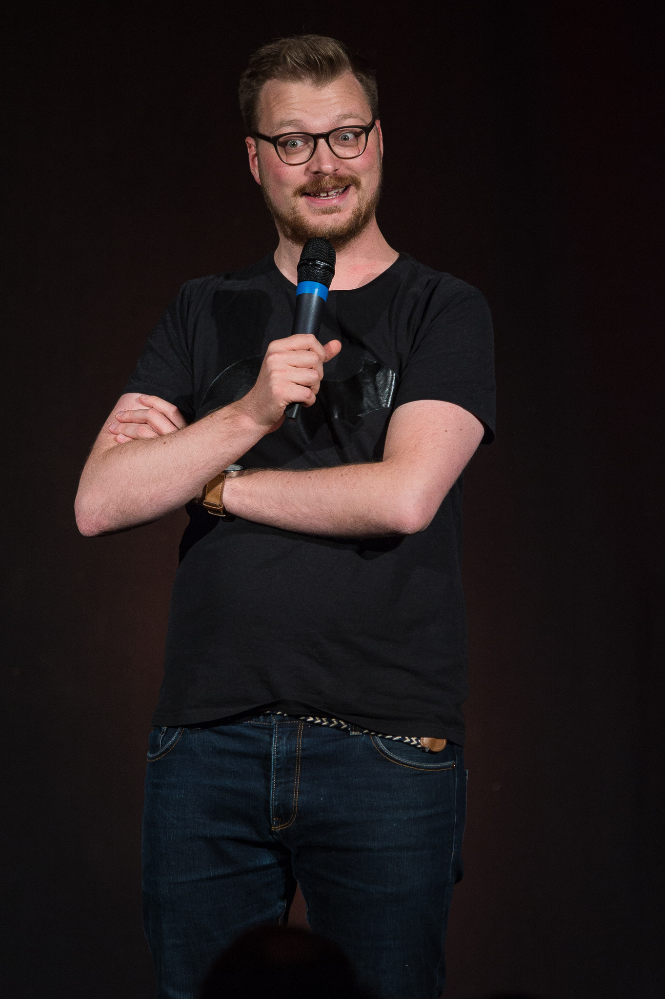 Comedy,Concertbüro Franken,Gutmann am Dutzendteich,Livecomedy,Maxi Gstettenbauer,Maximilian „Maxi“ Ronald Alfons Gstettenbauer,Stand-up-Comedy